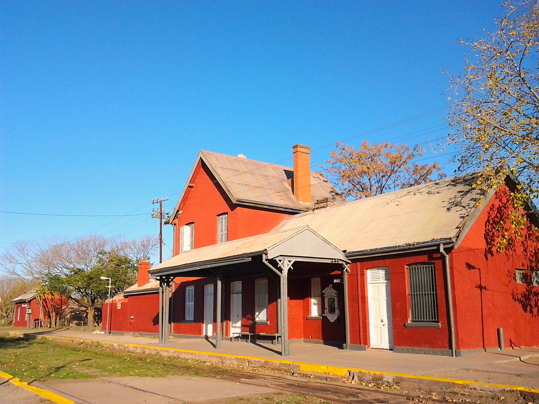 Estación Zelaya Junio del 2012